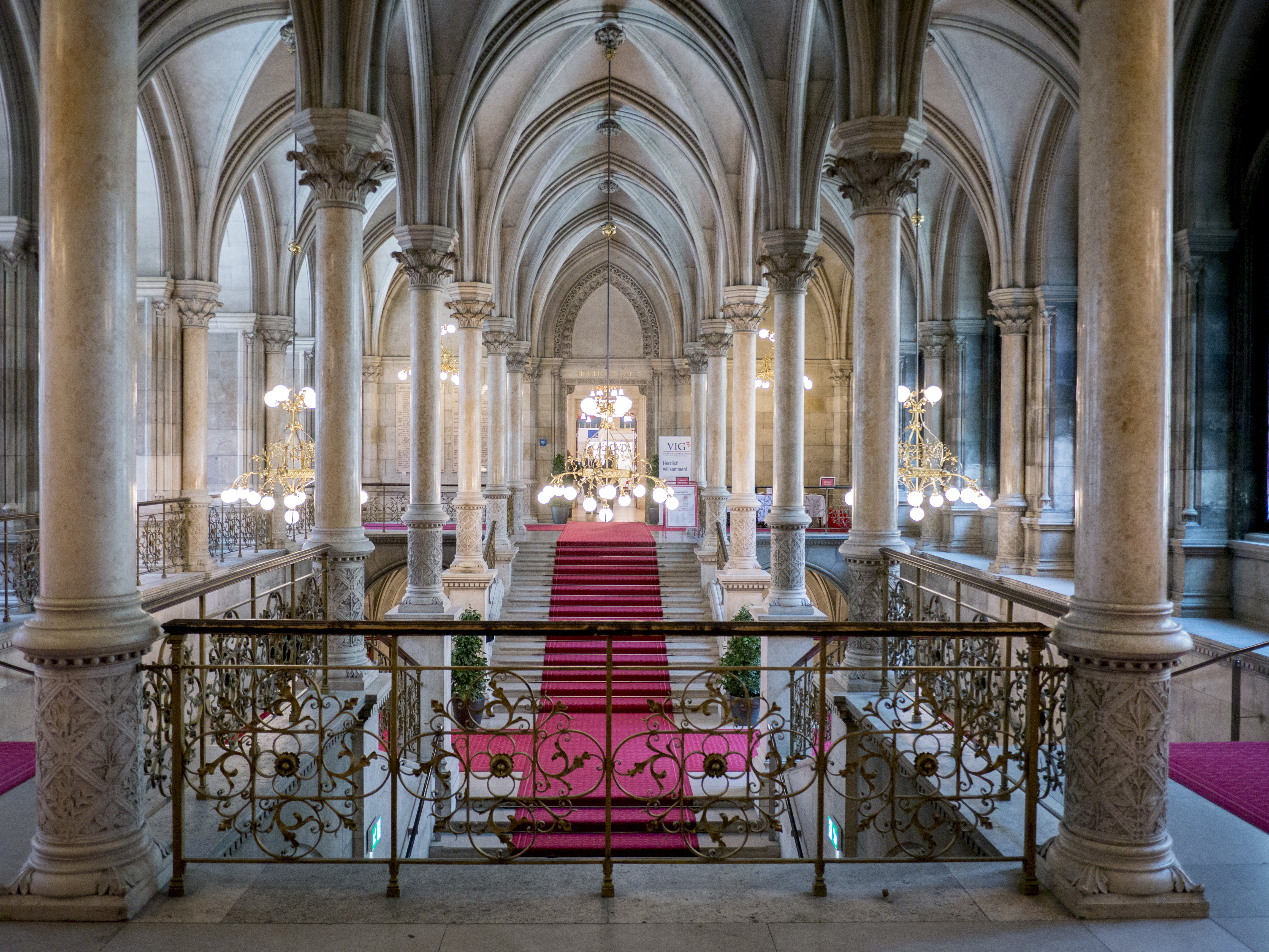 Wiener Rathaus Dieses Bild wurde anlässlich des österreichischen Tags des Denkmals 2015 in Wien eingereicht.